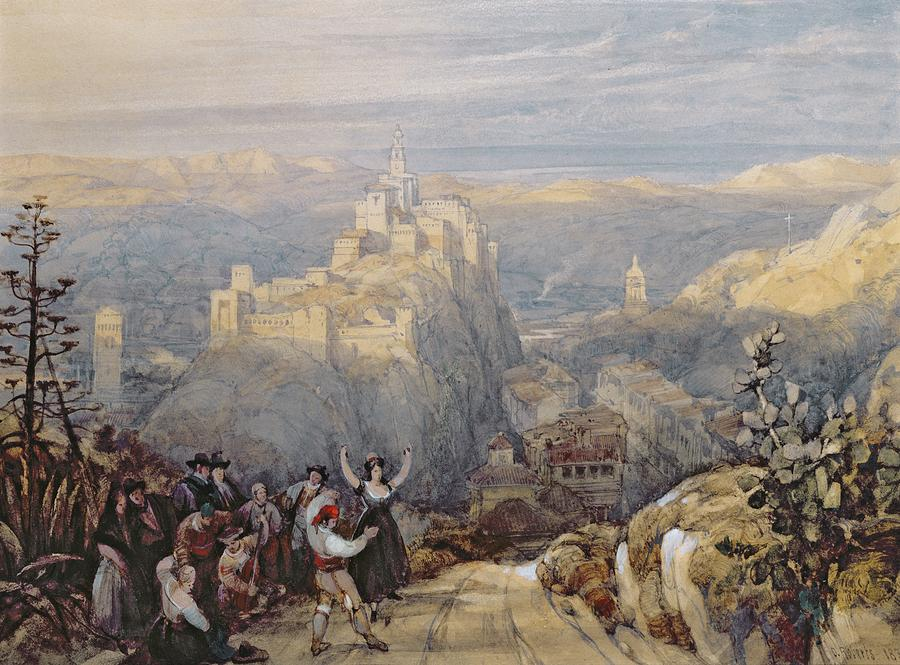 La ciudad y el castillo de Loja, España.